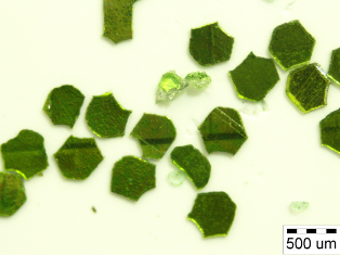 Çocuk aktivitelerinde, kostüm, tekstil süslemede kullanılan PET simler